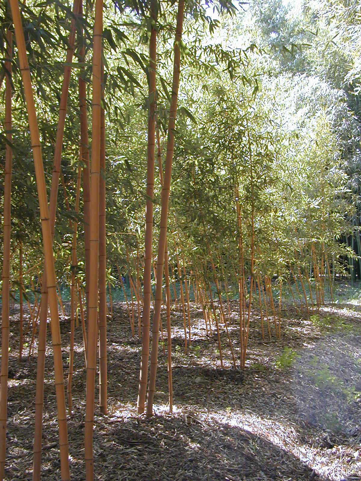 Phyllostachys bambusoïdes 'holochrysa' (Poaceae) - Chine- Bambouseraie de Prafrance à Anduze (Gard) et placée sous licence GFDL